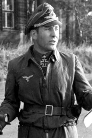 Theodor Weißenberger Deutschland. Eichenlaubträger Hauptmann Weißenberger, Gruppenkommandeur in einem Jagdgeschwader bei einer Nachbesprechung. Prop.-Kp. Lw.KBZ 15 Film-Nr.: 8279/10 Bildberichter: Schödl 4.10.44